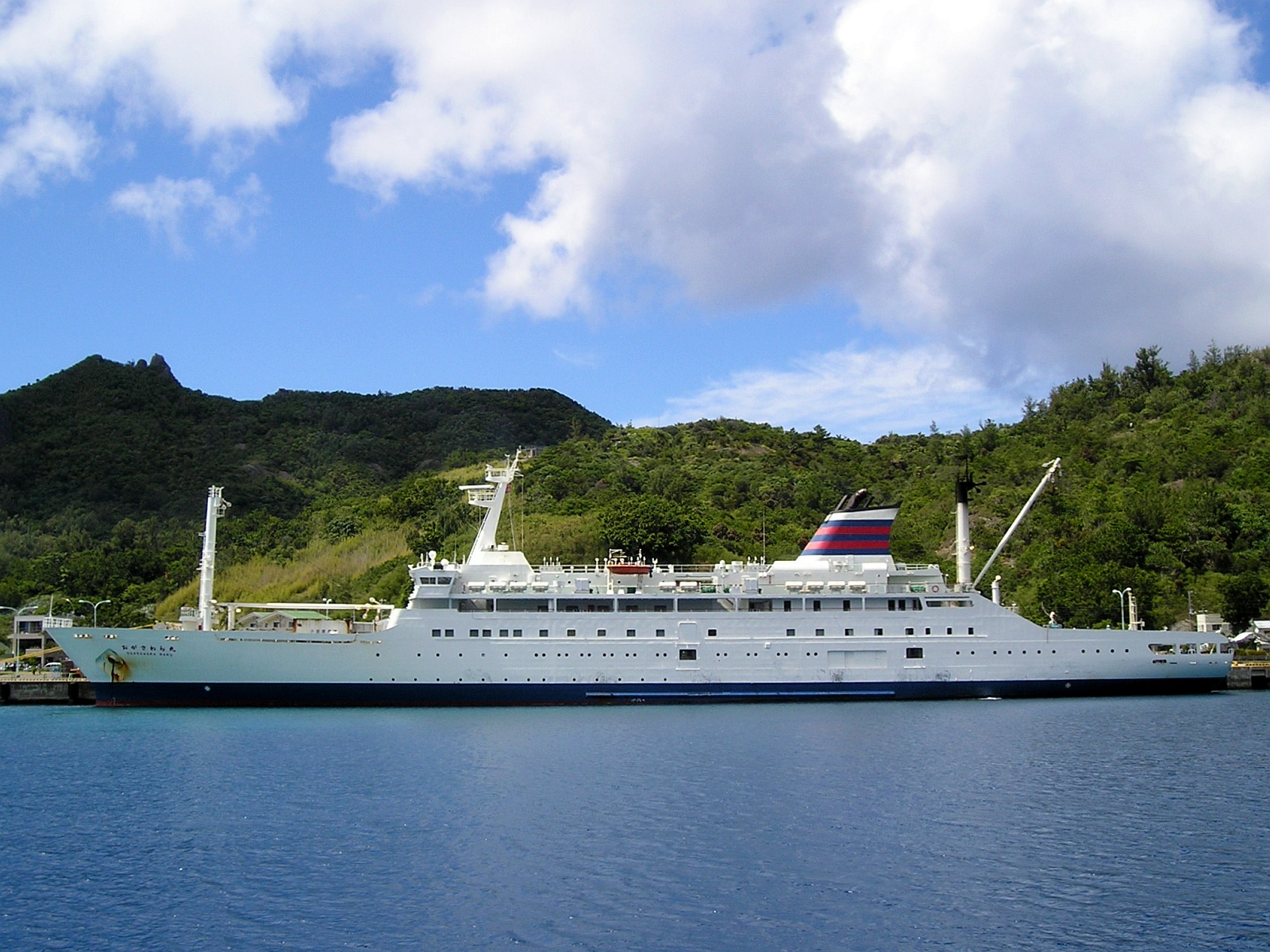 小笠原海運が運航する貨客船「おがさわら丸」。東京港（竹芝埠頭）と小笠原諸島の父島を結ぶ定期航路に就航している。（東京都小笠原村（父島）の二見港にて、ははじま丸より撮影。）